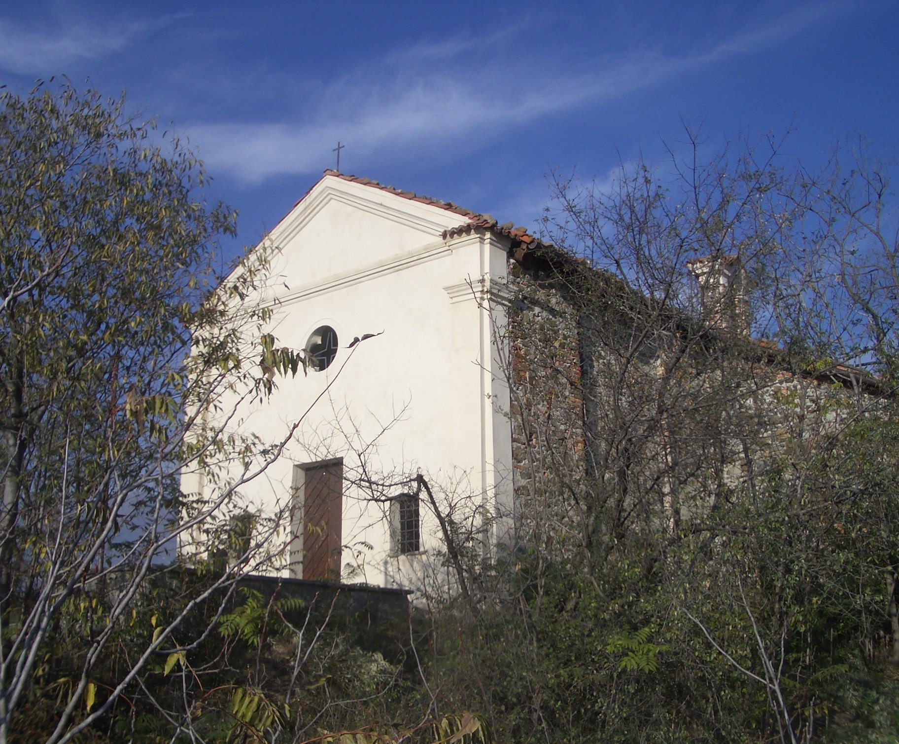 ==Summary" Ivrea, Cappella dei Tre Re